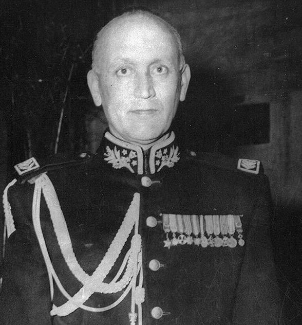 در زمان ریاست ستاد ارتش